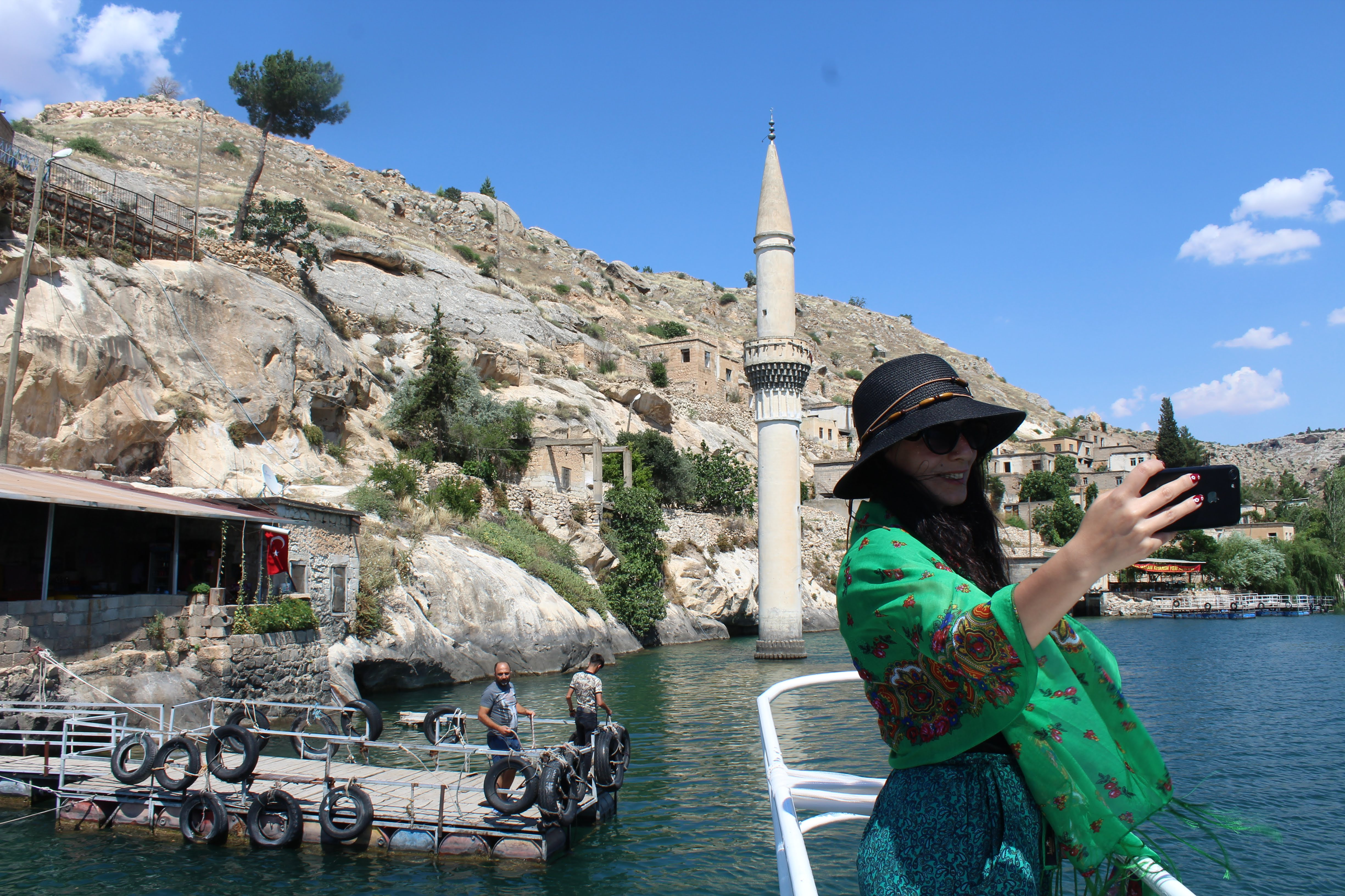 Fırat Gölünün suları altında qalan Halfeti